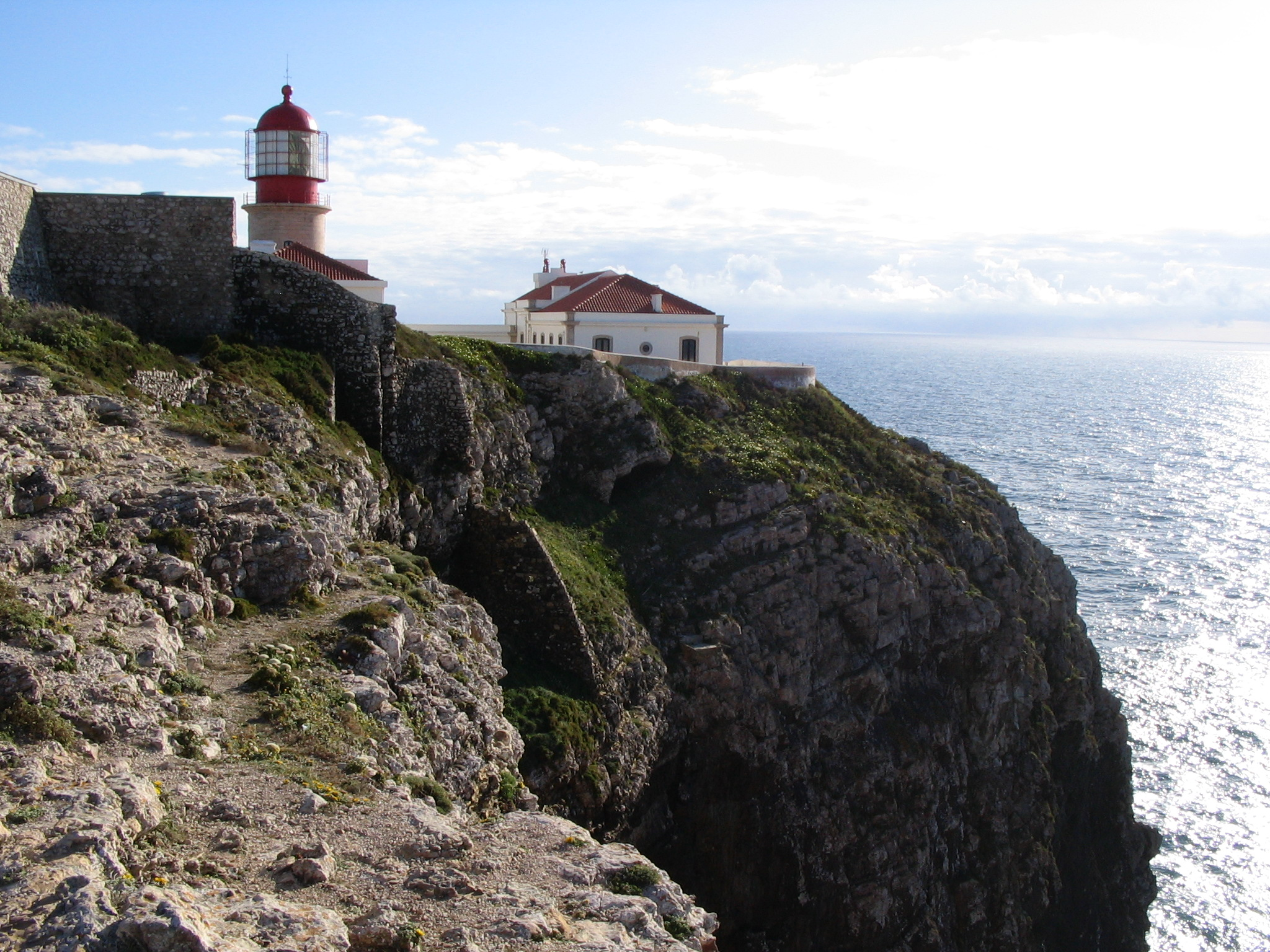 Cabo san Vicente